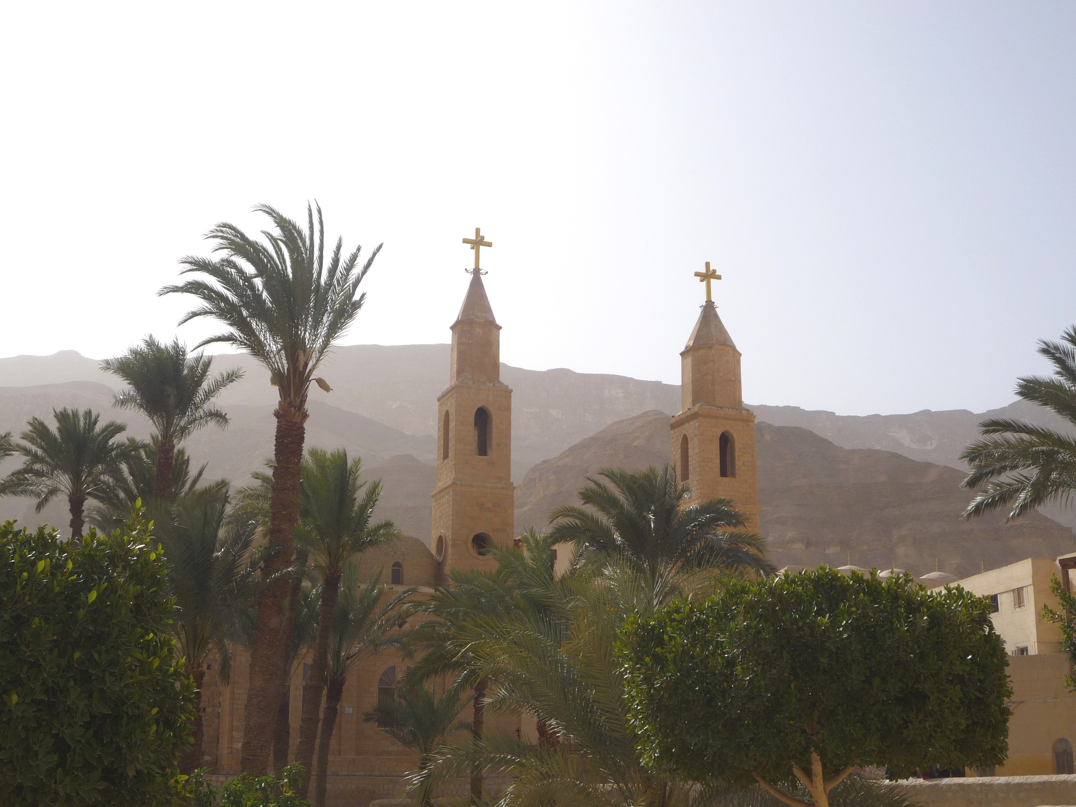 Anba Antonios's monastery